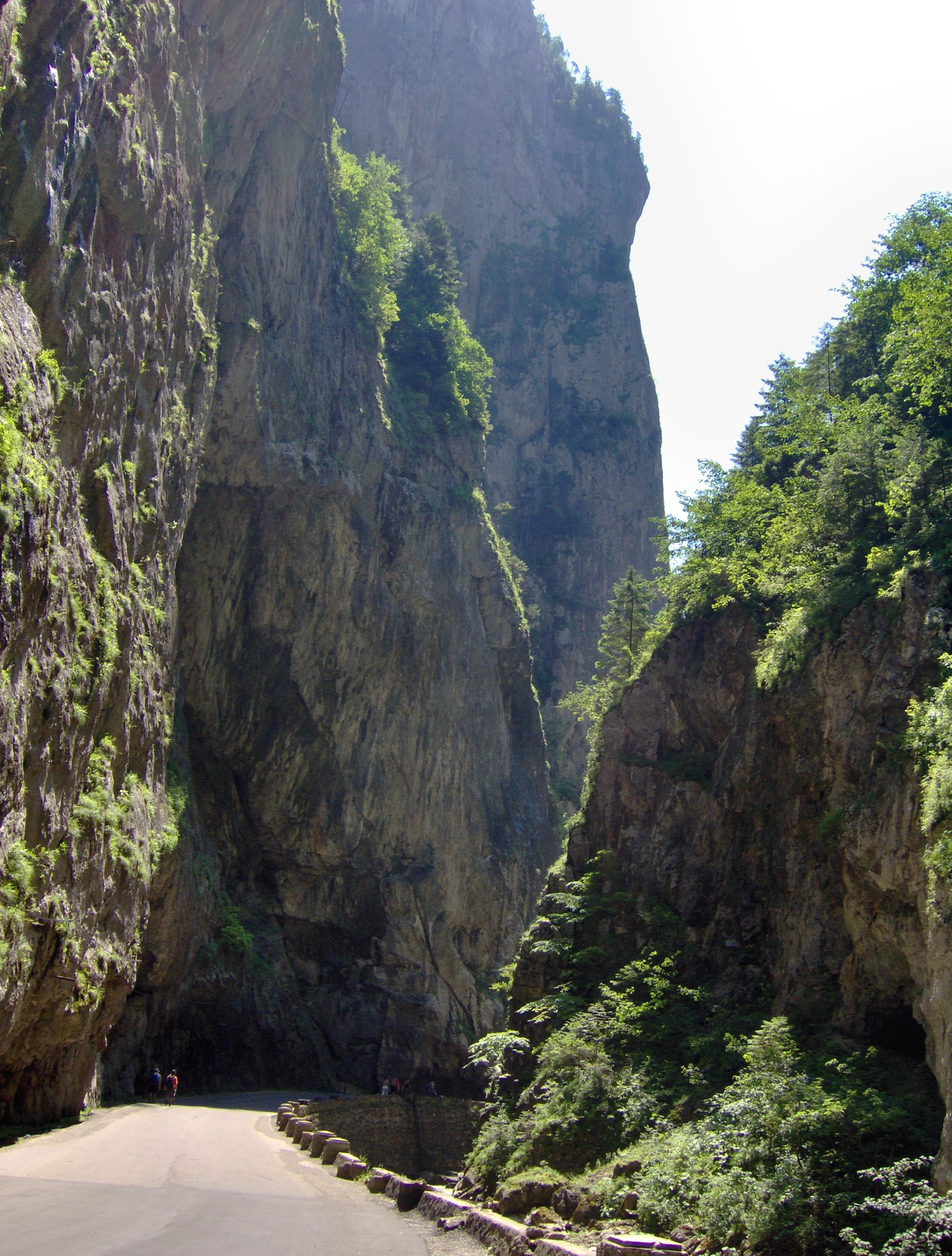 Cheile Bicazului, 2006